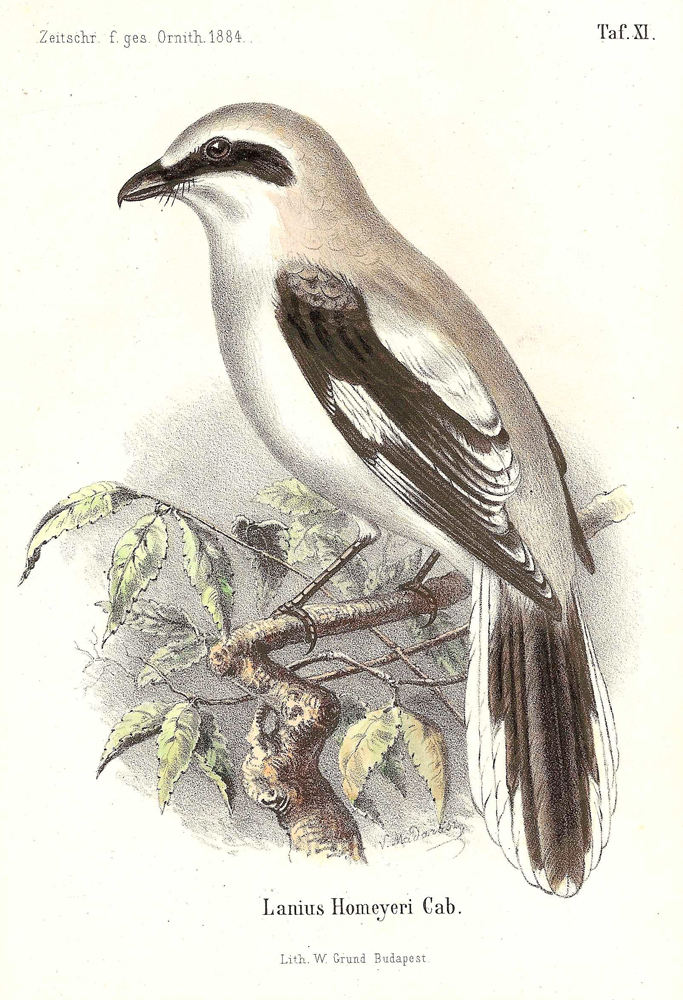 Nagy őrgébics Madarász Gyula illusztrációja